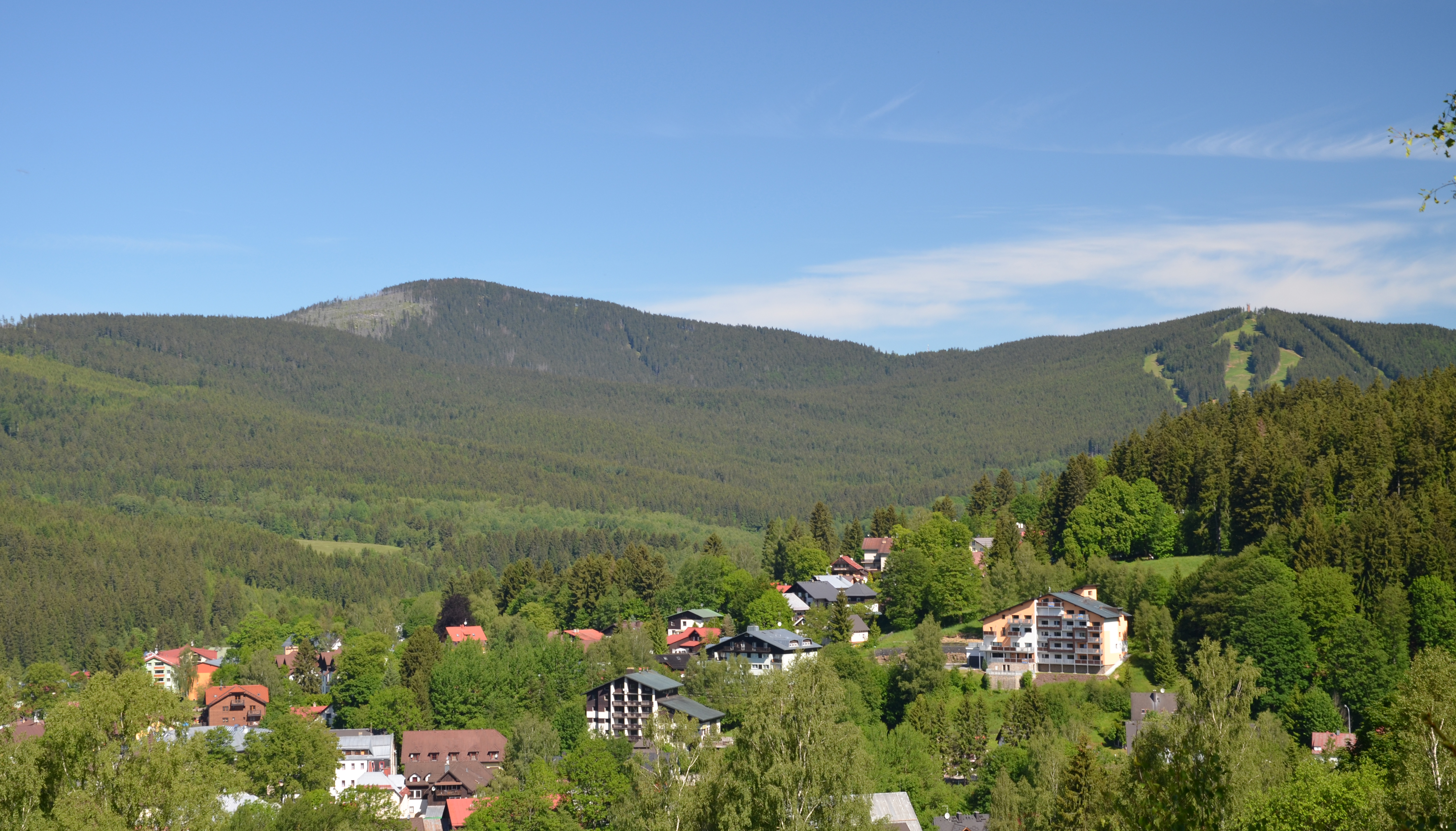 Jezerní hora (1343 m) na Šumavě, pohled z JV, v popředí Železná Ruda, vpravo Špičák (1205 m)